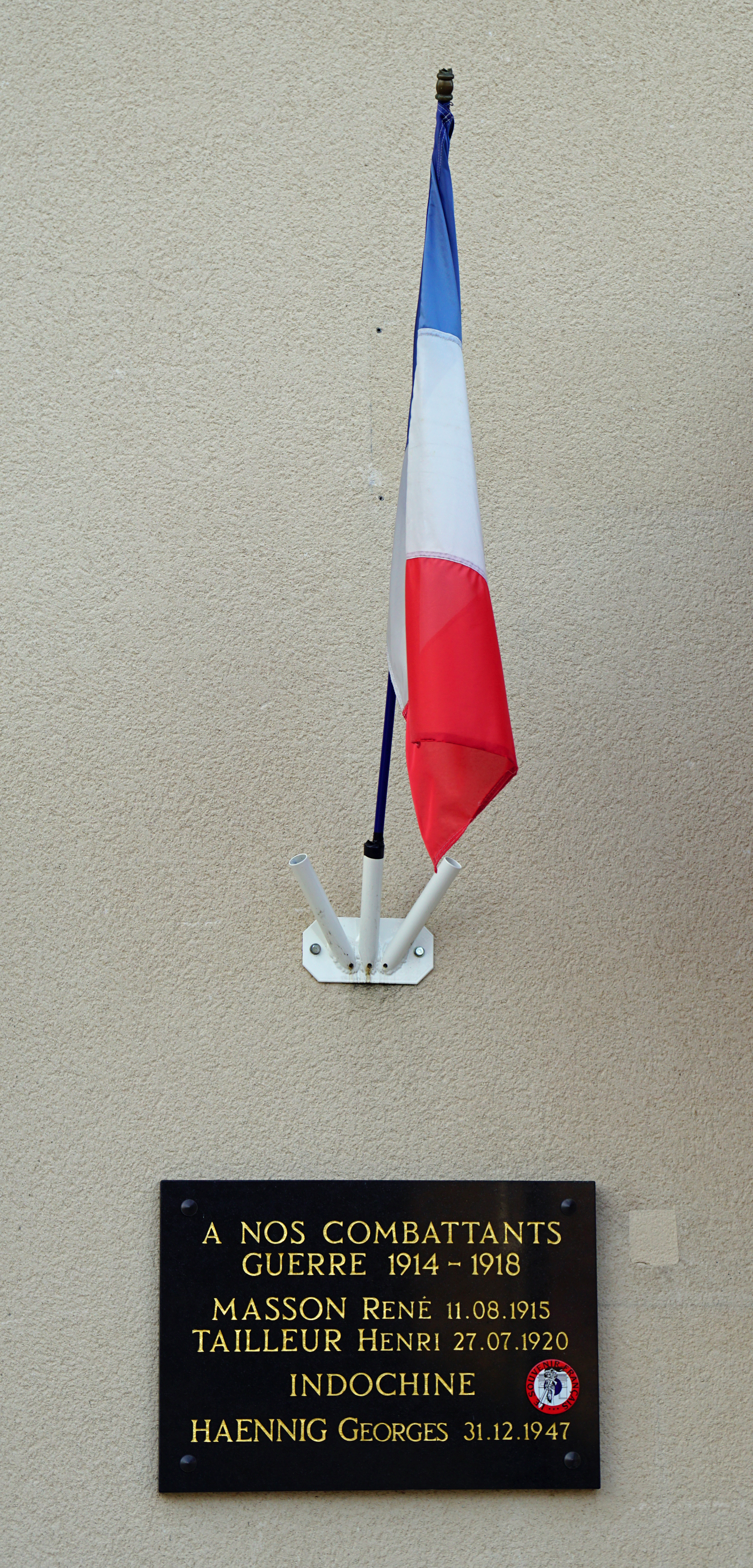 Le Val-de-Gouhenans (hommage aux combatants).